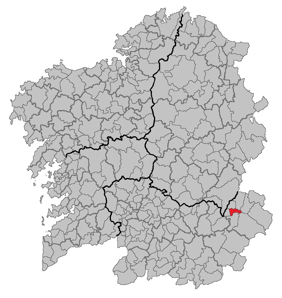 Mapa coa localización do concello de Petín.